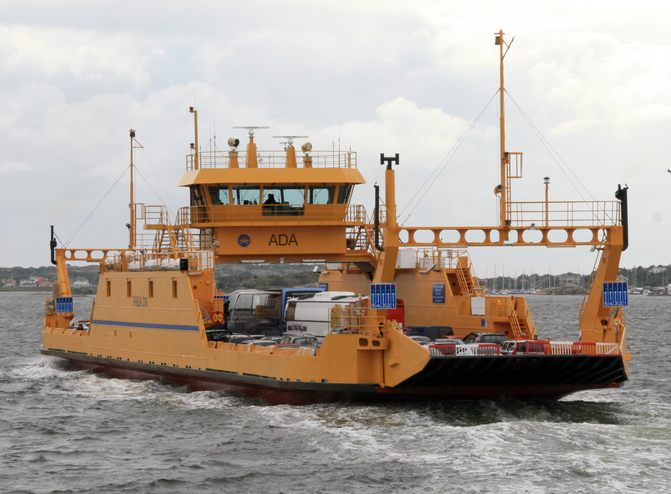 Ada på Hönöleden 12 juli 2007.